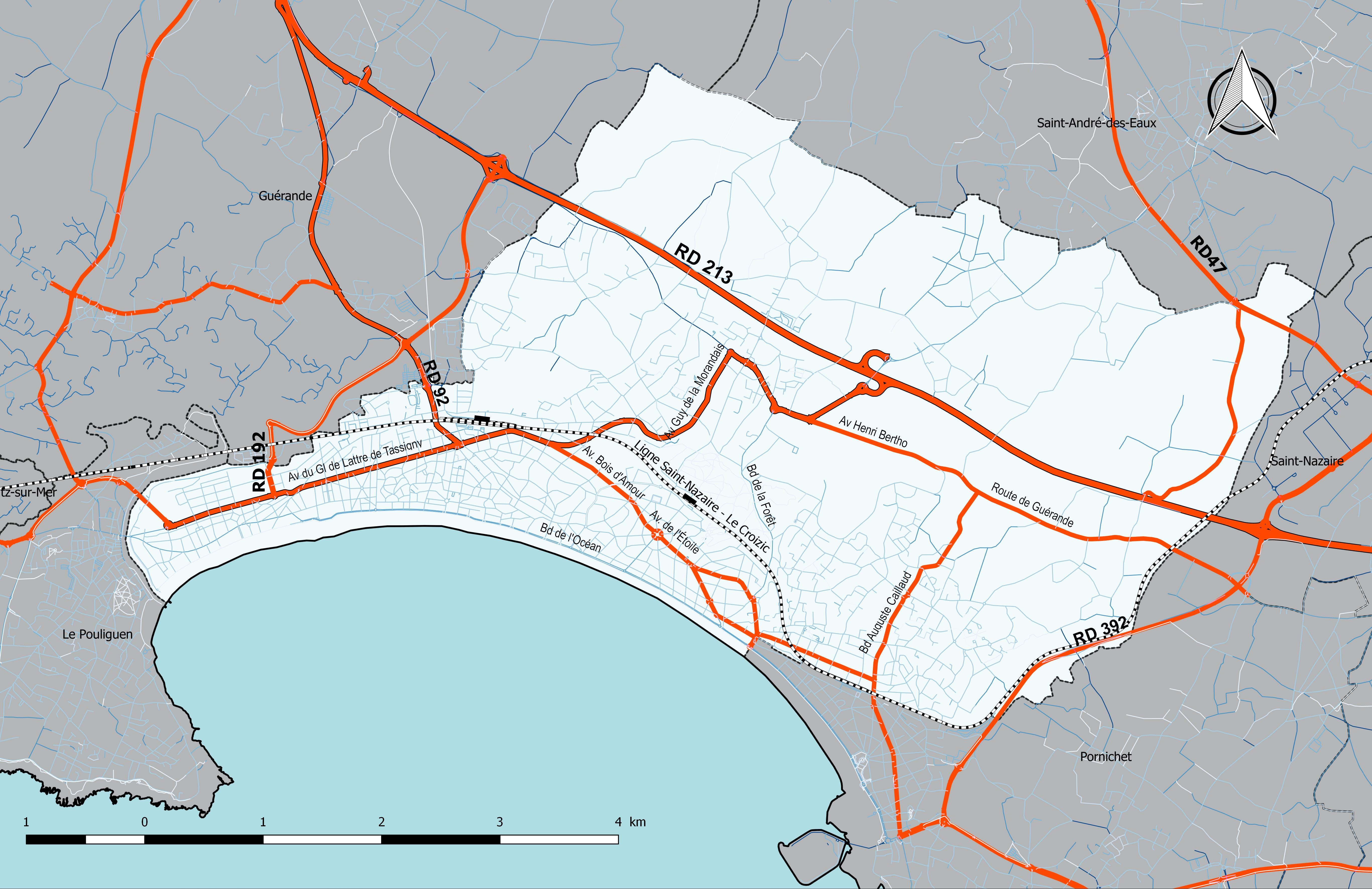 Commune de La Baule-Escoublac - Carte des principales voies de communication (routes, fer)